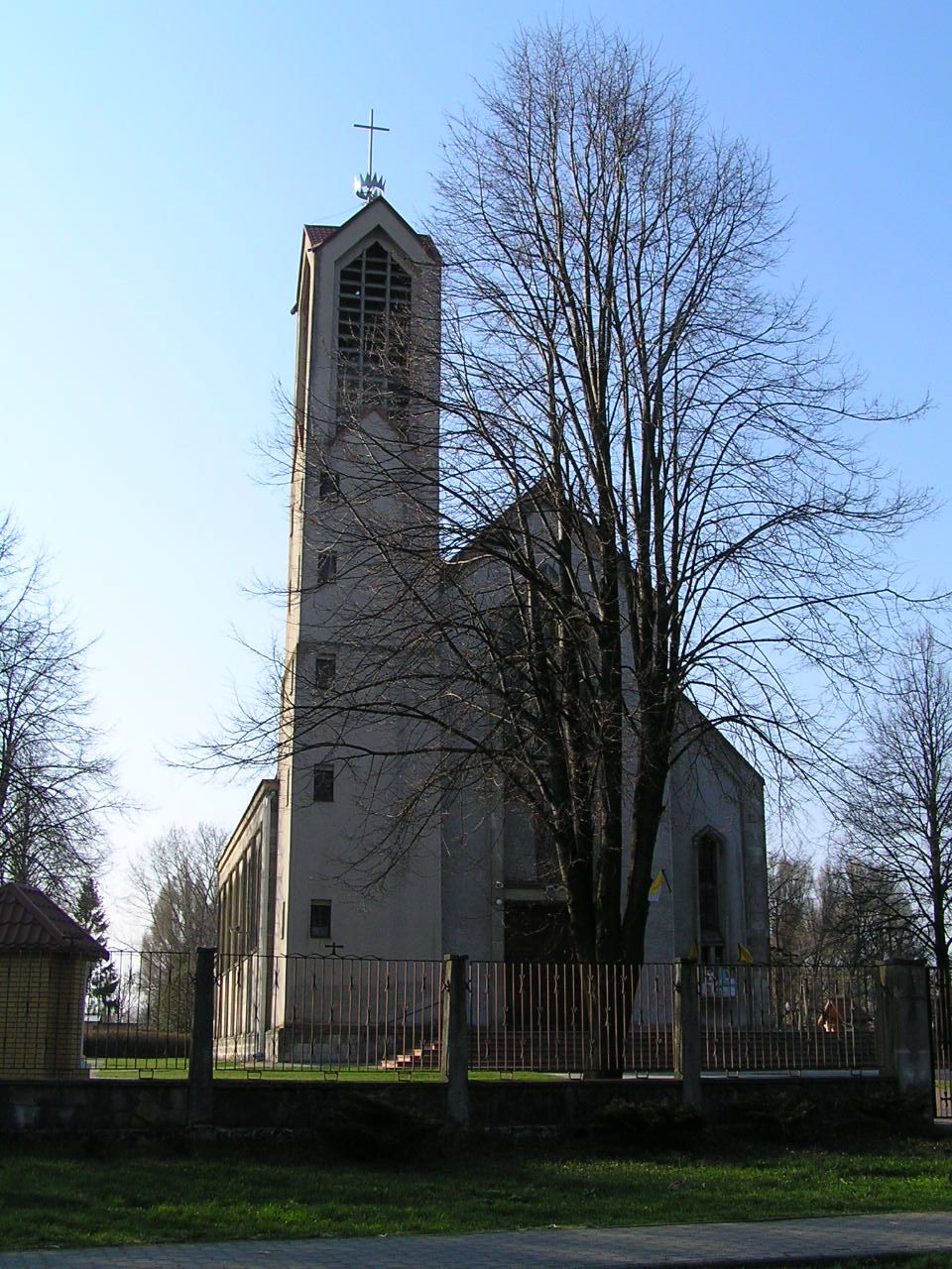 Trawniki - kościół parafialny pw. Chrystusa Króla autor: Yarek shalom 22:18, 10 October 2006 (UTC)yarek shalom